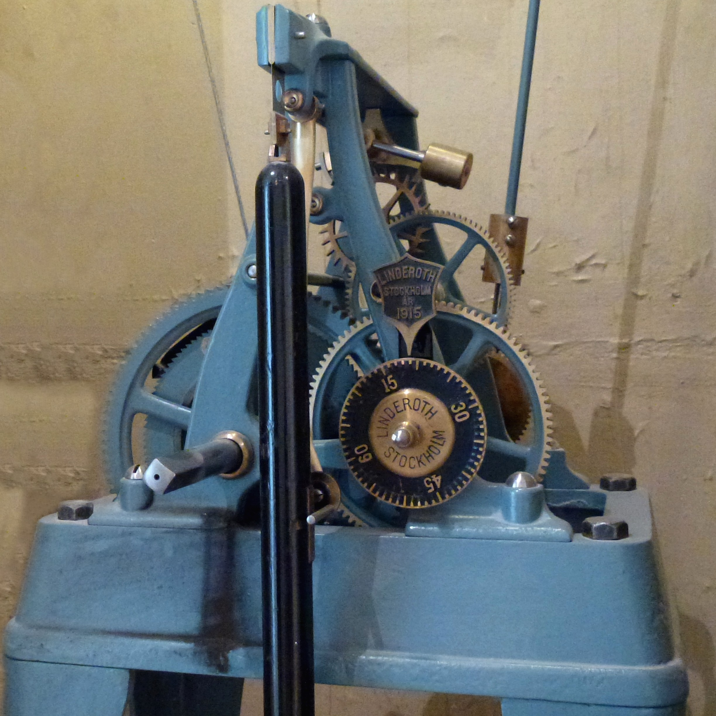 Urverket för Stockholm-Roslagens-Järnvägars klocka vid Engelbrektsplan